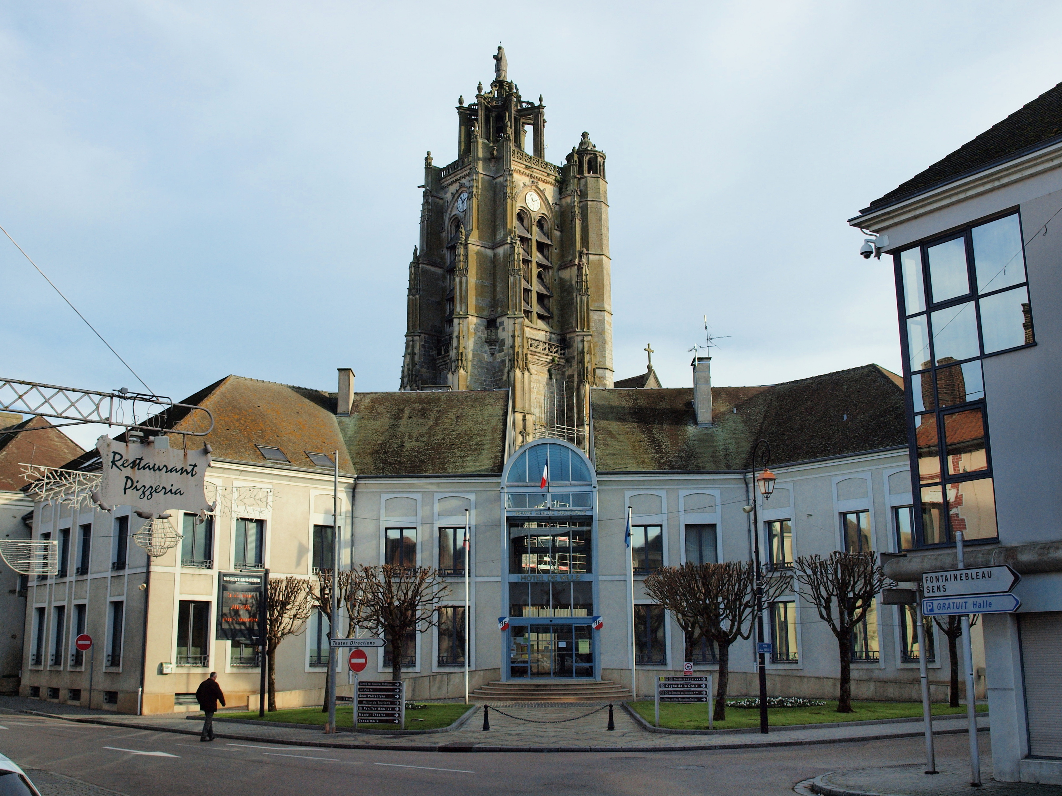 Nogent-sur-Seine (Aube, France)